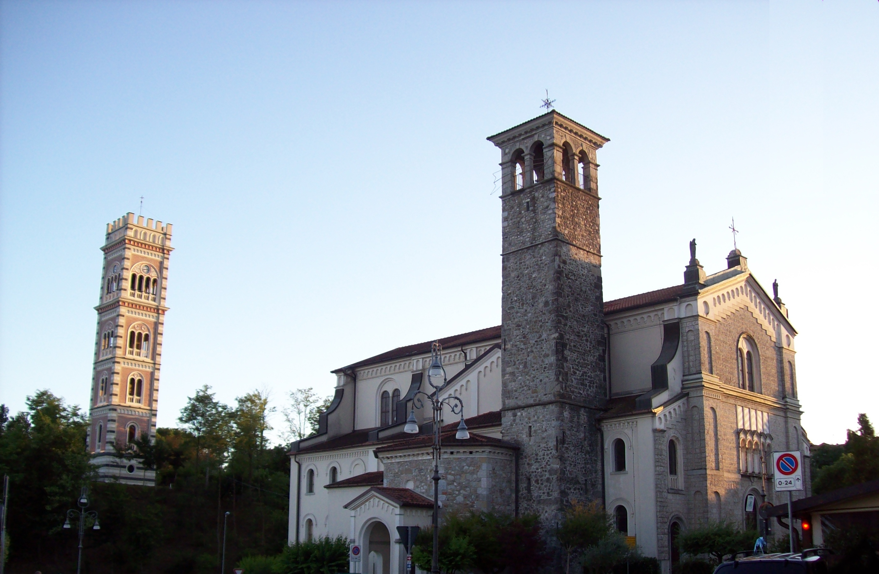 Cassacco (UD) - Chiesa di San Giovanni Battista e Torre campanaria in piazza Noacco